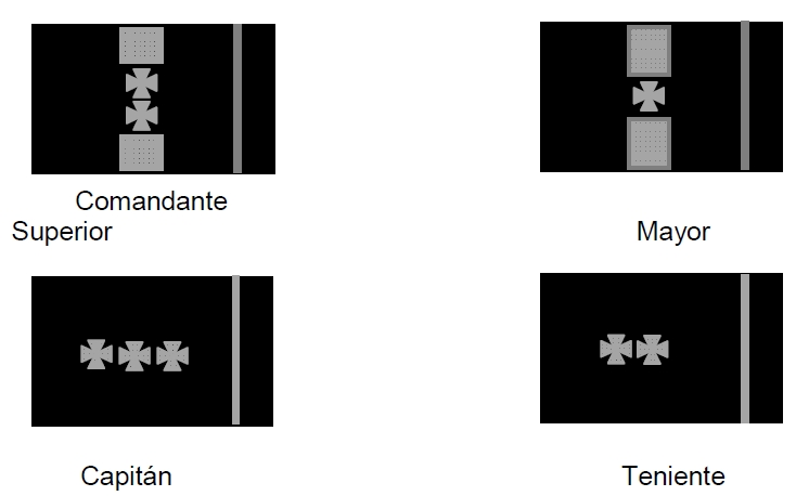 Presillas para el personal de oficiales en uniforme de fatiga del cuerpo de custodia y vigilancia nacional del INPEC